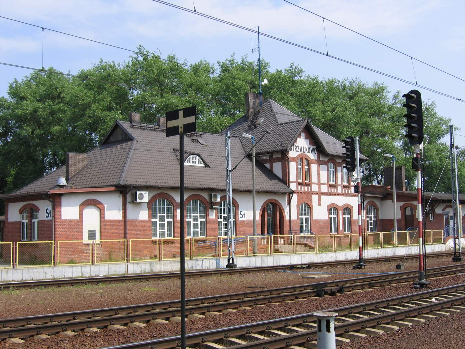 Budynek dworca w Strzałkowie, 2007, (foto. Marcin Majdecki)